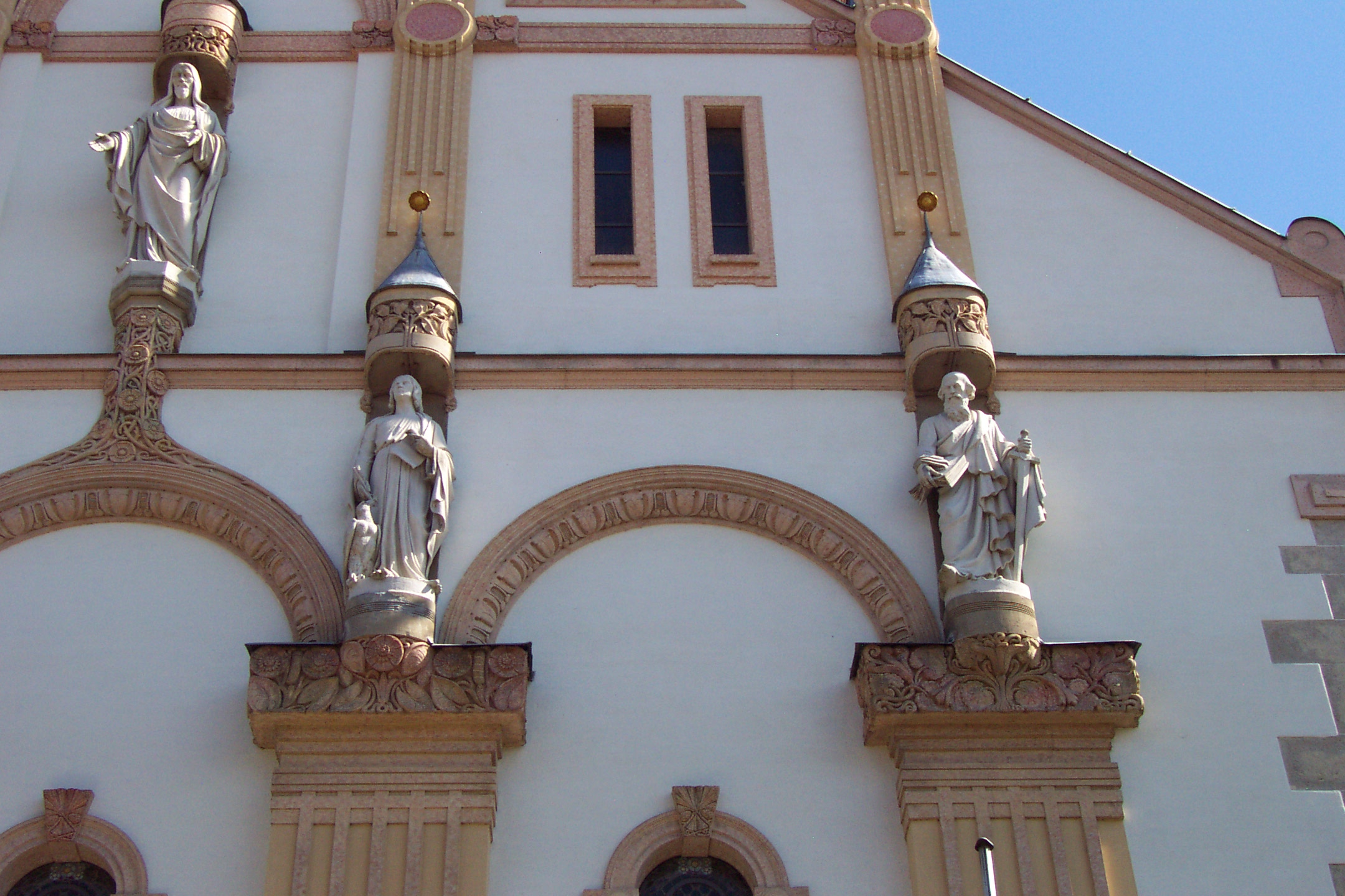 Fassade der Stadtkirche Tuttlingen, Christus, Johannes und Paulus